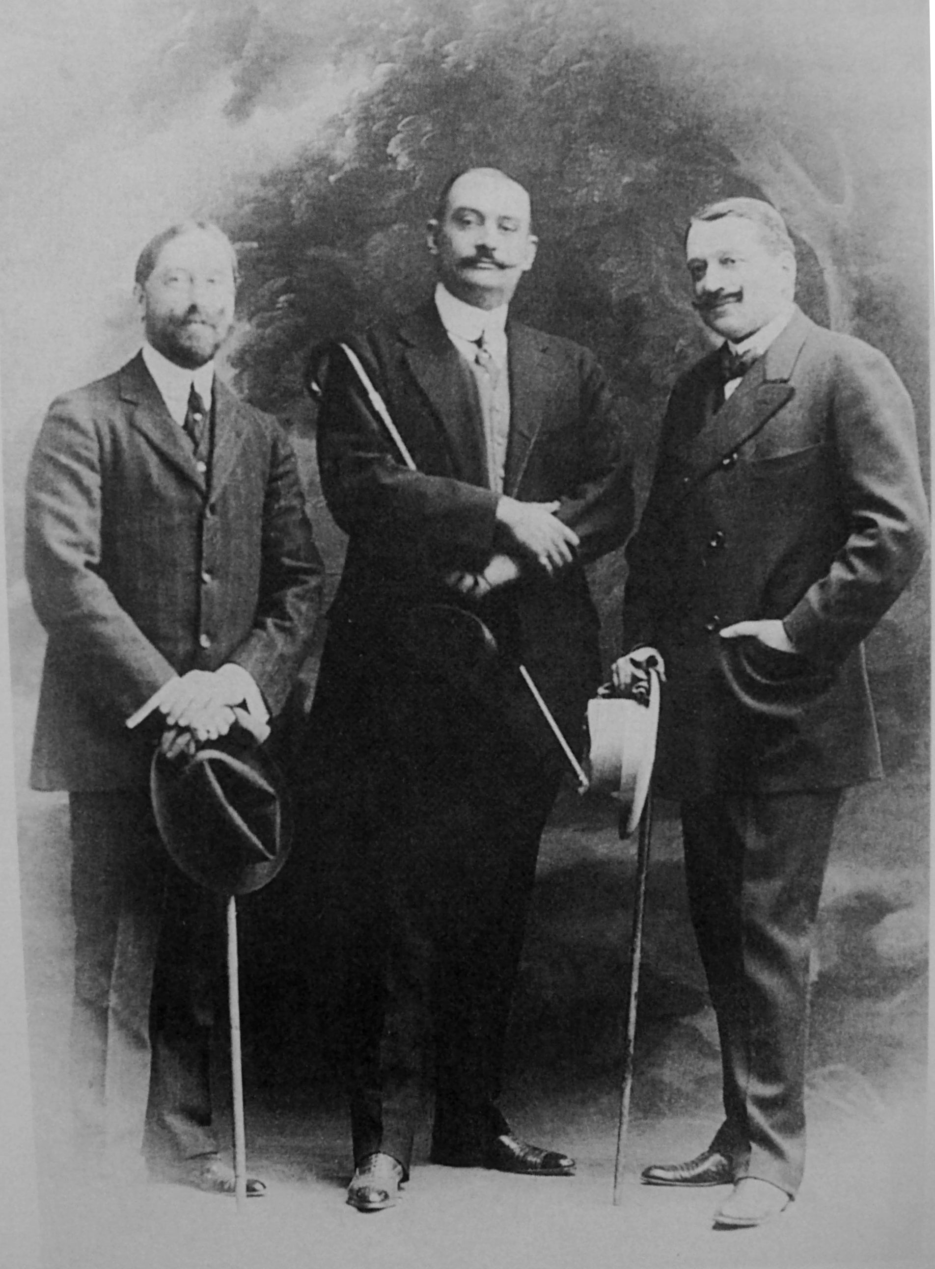 Es una foto con (de izq a der): Fernando Saguier, Marcelo T. de Alvear y Tomás Le Breton.